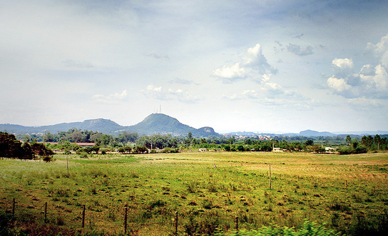 Montes chamados de "O Gigante de Pedra" em Montenegro, Rio Grande do Sul, Brasil.